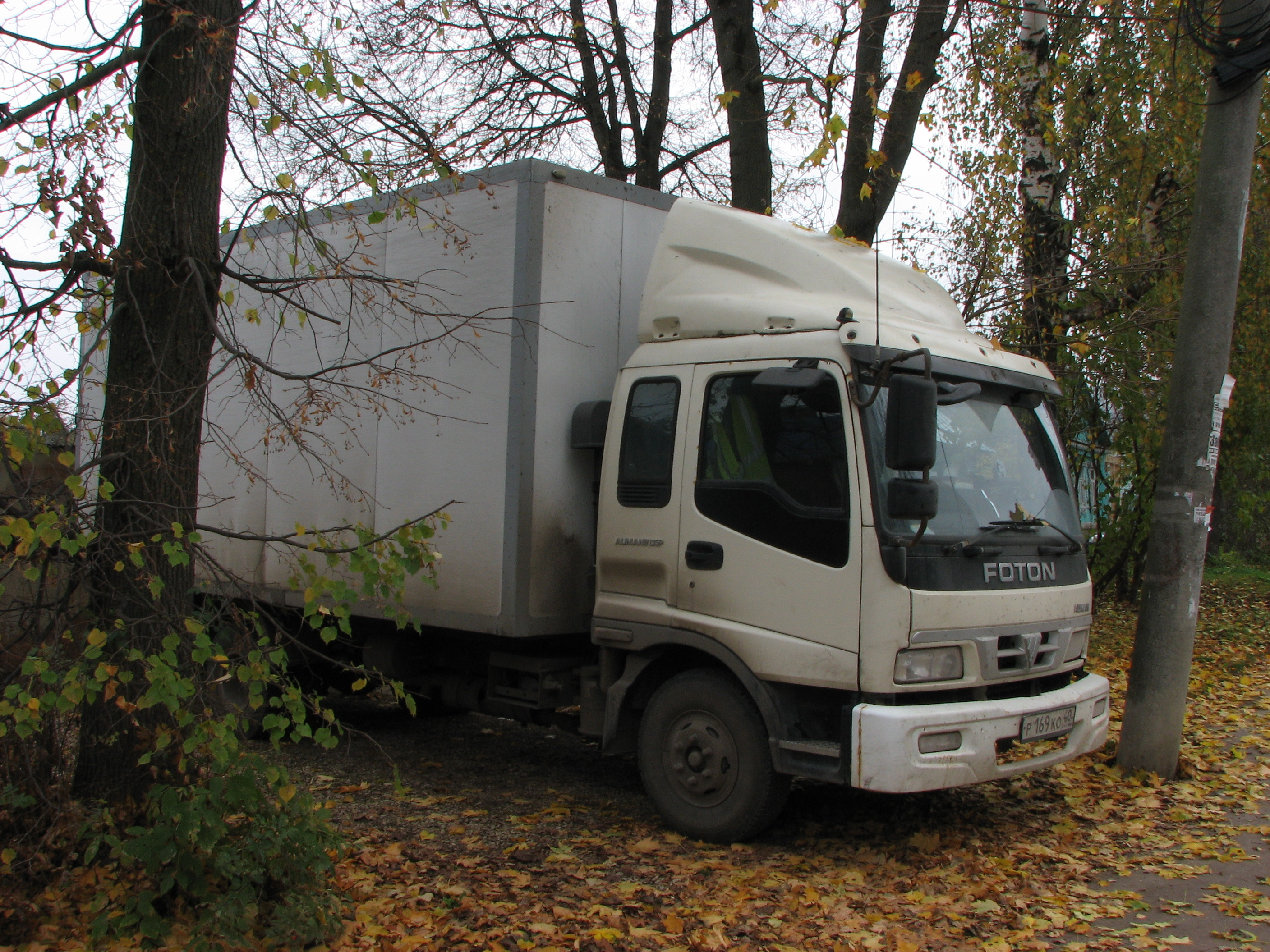 Foton_Auman_IV_135P_Kaluga